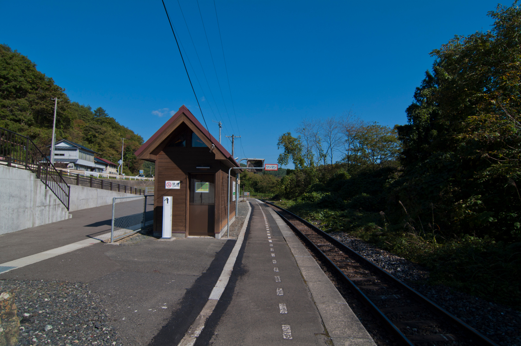 東日本旅客鉄道釜石線岩根橋駅